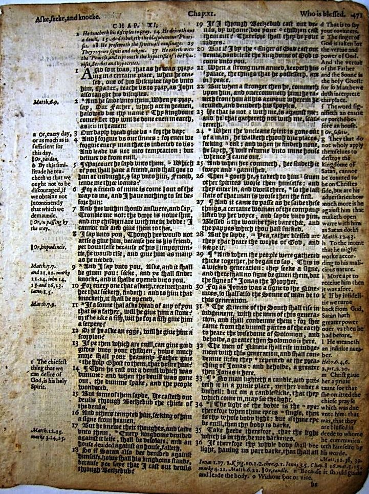 Biblia de Génova, Padre Nuestro, según San Lucas